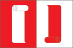 Флаг города Струнино Владимирской области